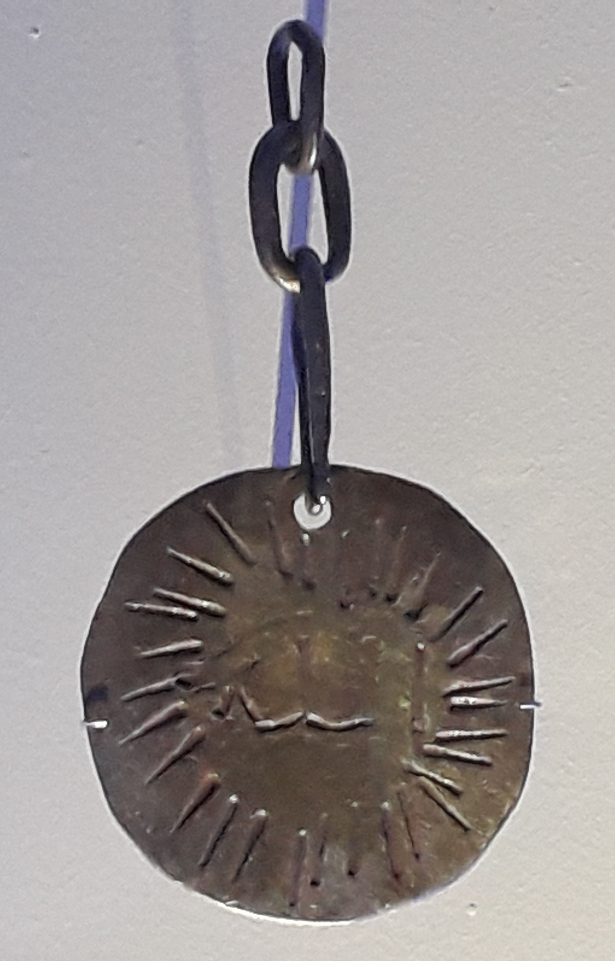 Qarabawi’s Charm (« amulette de Qarabawi ») : pendentif de dromadaire en fer météoritique (date inconnue). The Smithsonian Institution, Washington D.C. Provenance : désert égyptien. L'objet aurait servi de talisman pour protéger du mauvais œil le troupeau de dromadaires de la tribu nomade des Qarabawi. Exposé à Paris à l'occasion de l'exposition "Météorites", dans le bâtiment de la grande galerie de l'évolution, au Muséum national d'histoire naturelle de Paris (18 octobre 2017 - 10 juin 2018).